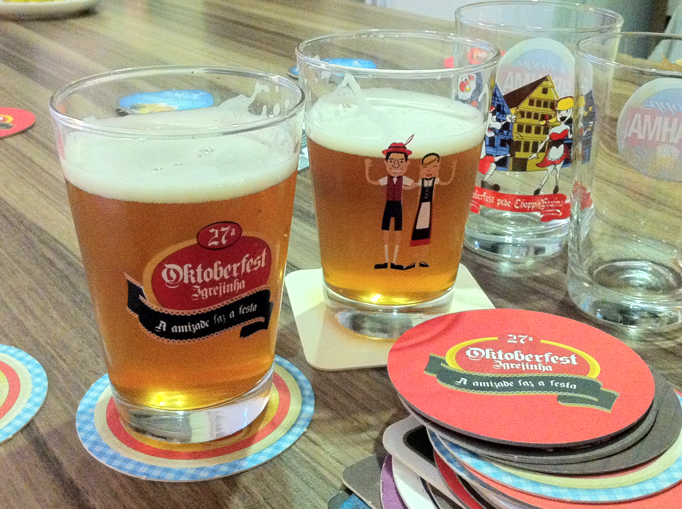 Chope na Oktoberfest de Igrejinha, Brasil. Bier auf dem Oktoberfest Igrejinha, Brasilien. 2014